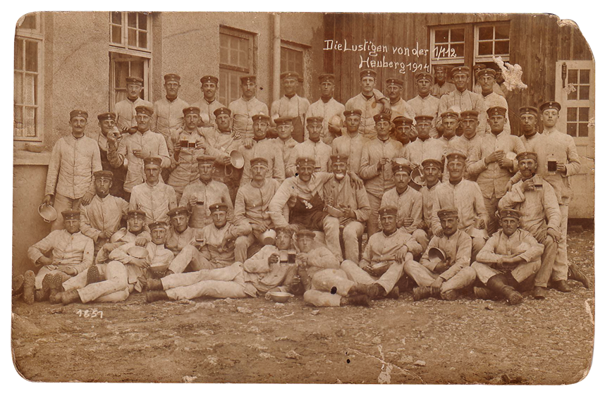 Juli 1914, auf dem Übungsplatz Heuberg bei Stetten. Letzte Manöver vor Ausbruch des Krieges. Auf dem Bild ist ein Teil der 1.Kompanie zu sehen. Alle Soldaten tragen Drillich. Dominique steht ganz links entlang der Mauer,eine kleine Blechschale in der Hand. Obwohl der Krieg vor der Tür steht, sind die Soldaten lustig/ Juillet 1914, sur le terrain de manœuvres de Heuberg à Stetten. Les dernières manœuvres avant le déclenchement des hostilités. Sur la photo, une partie de la 1e compagnie est rassemblée. Dominique se tient debout à gauche contre le mur, une petite bassine métallique dans la main. Bien que la guerre est toute proche, les soldats sont de bonne humeur.